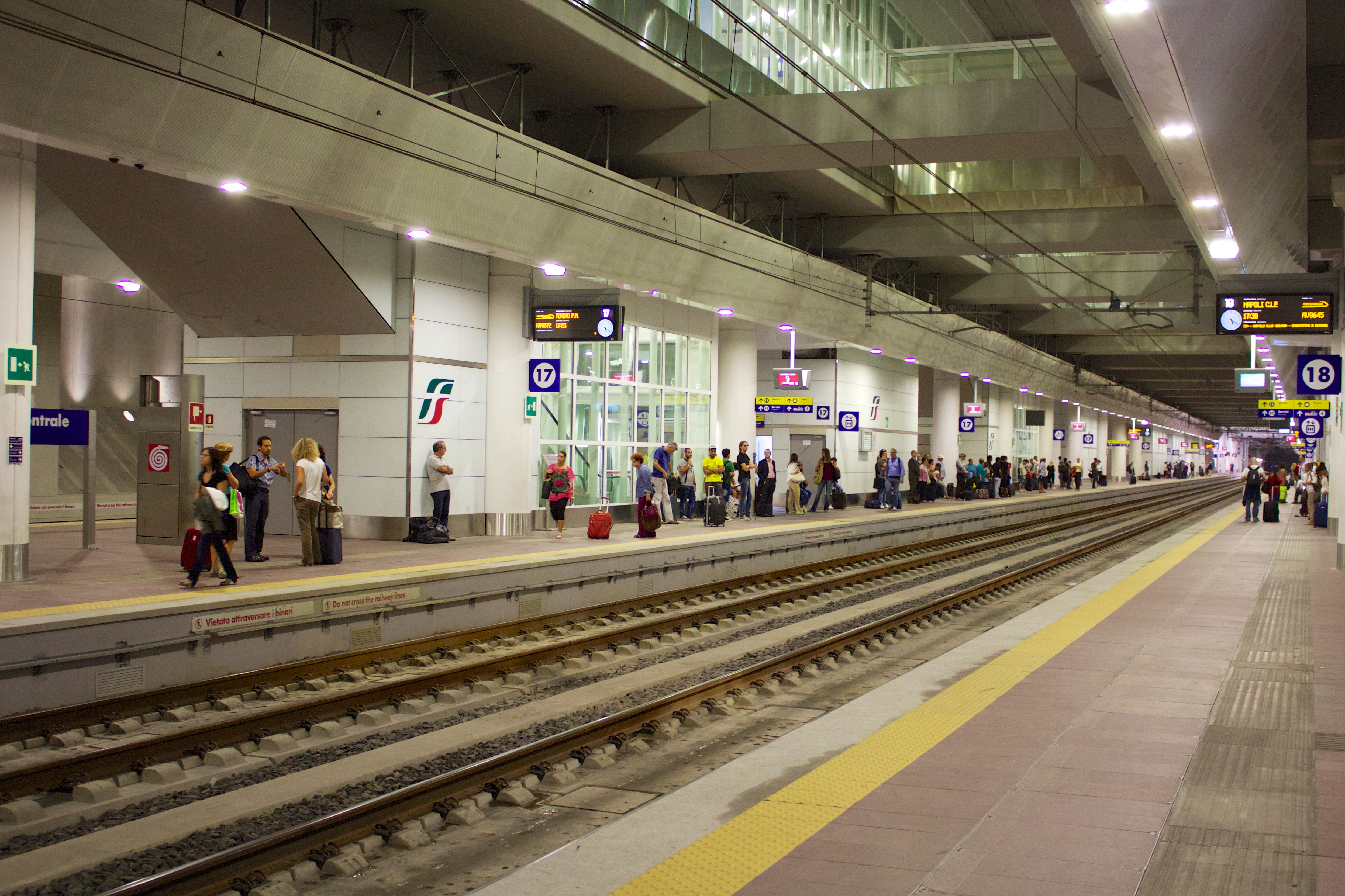 Binari della stazione di Bologna Centrale AV